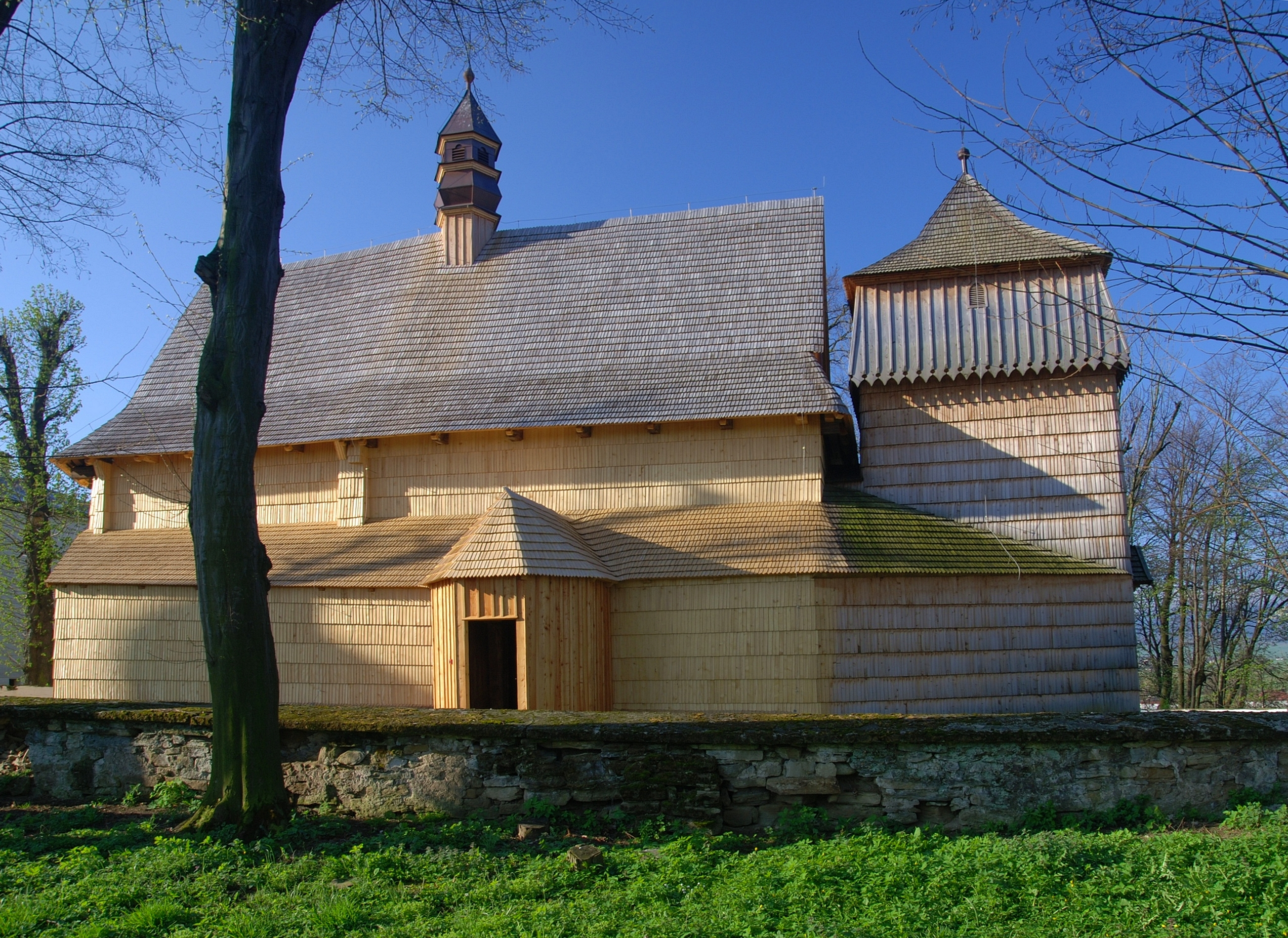 Kościół Przemienienia Pańskiego w Osieku Jasielskim